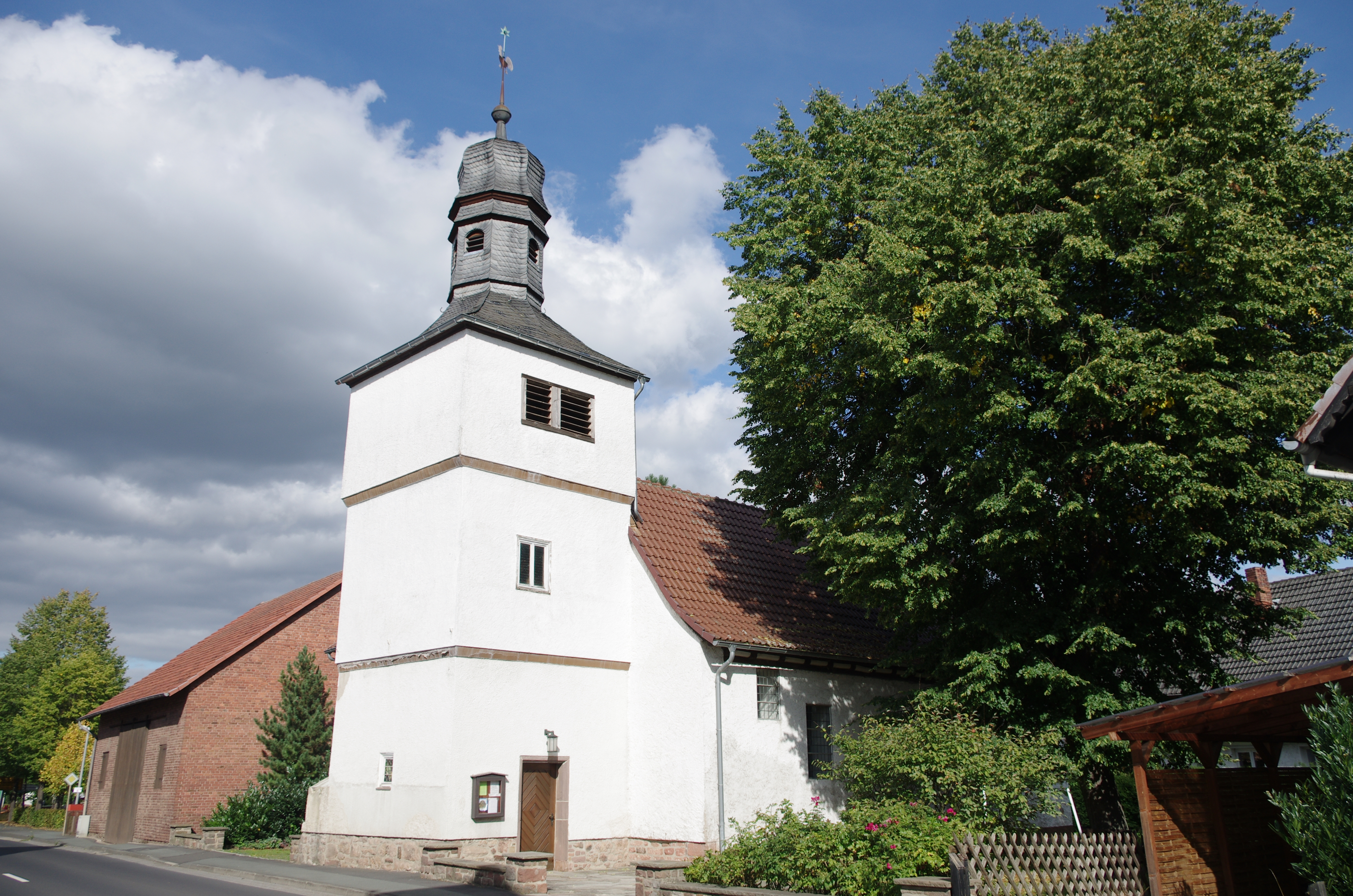 Bad Wildungen, Ortsteil Wega in Hessen. Die Kirche befindet sich an der Hauptstraße in Wega.